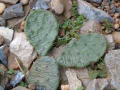 Opuntia compressa télen